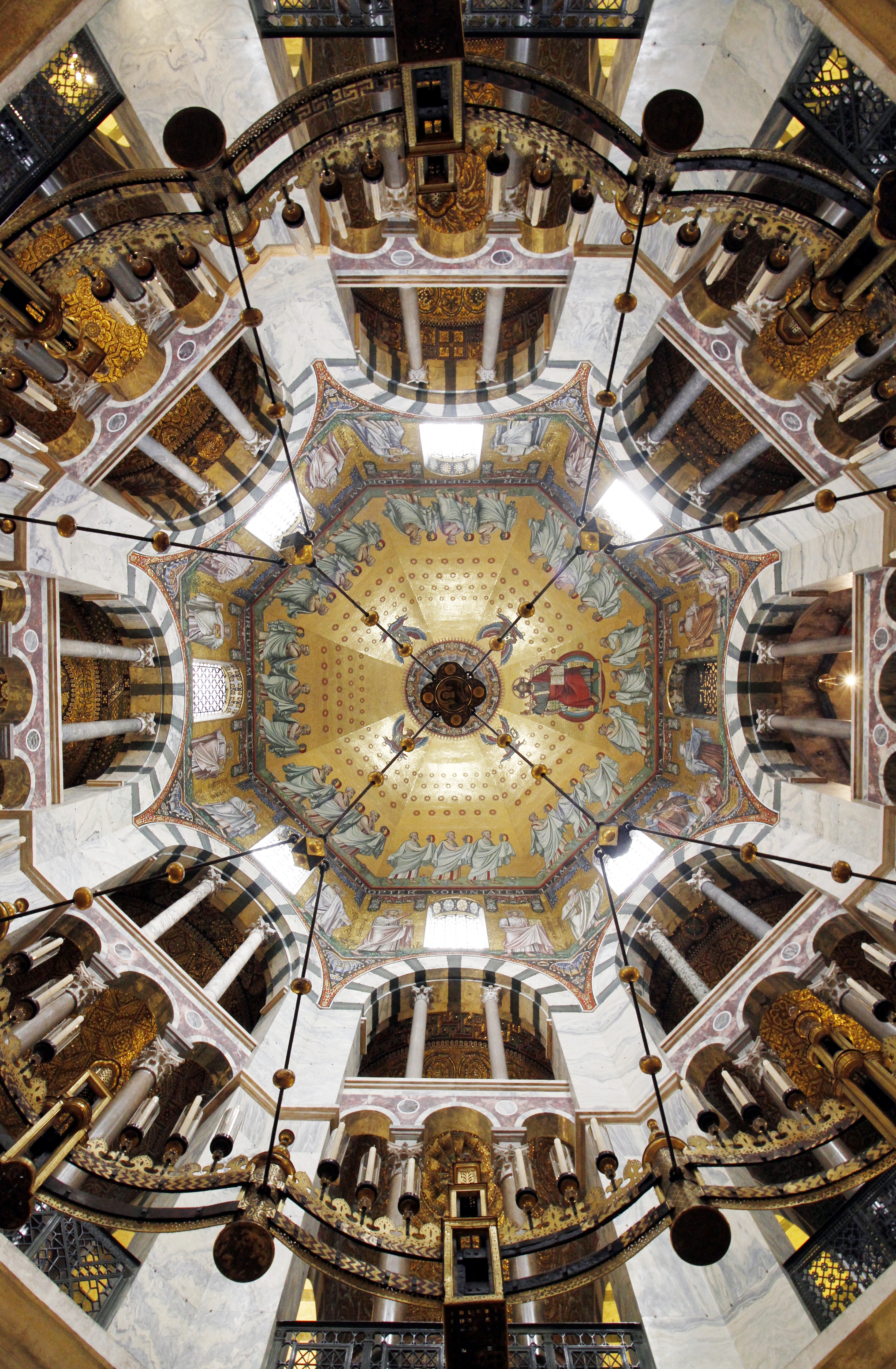 Palatine Chapel - Aachen